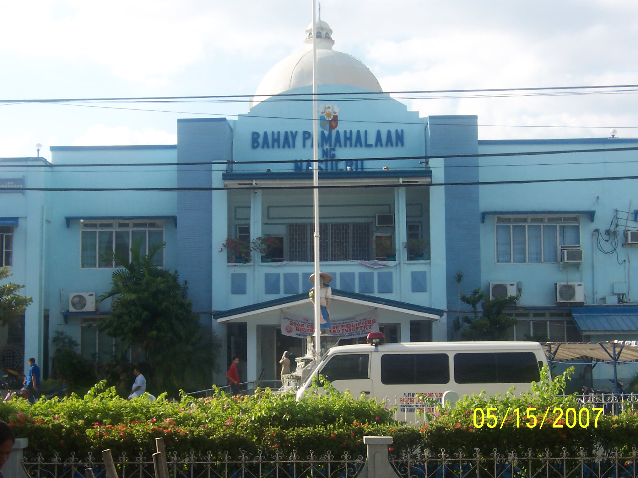 Tagalog: Kuha ni Jayzl Villafania-Nebre (user name Nasugbu Batangas)